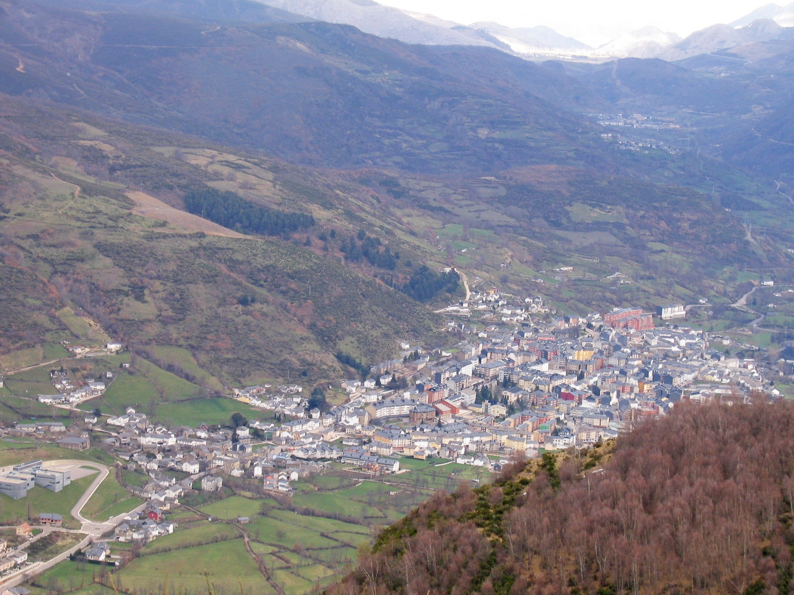 San Miguel de Laciana y Villablino (León, España).